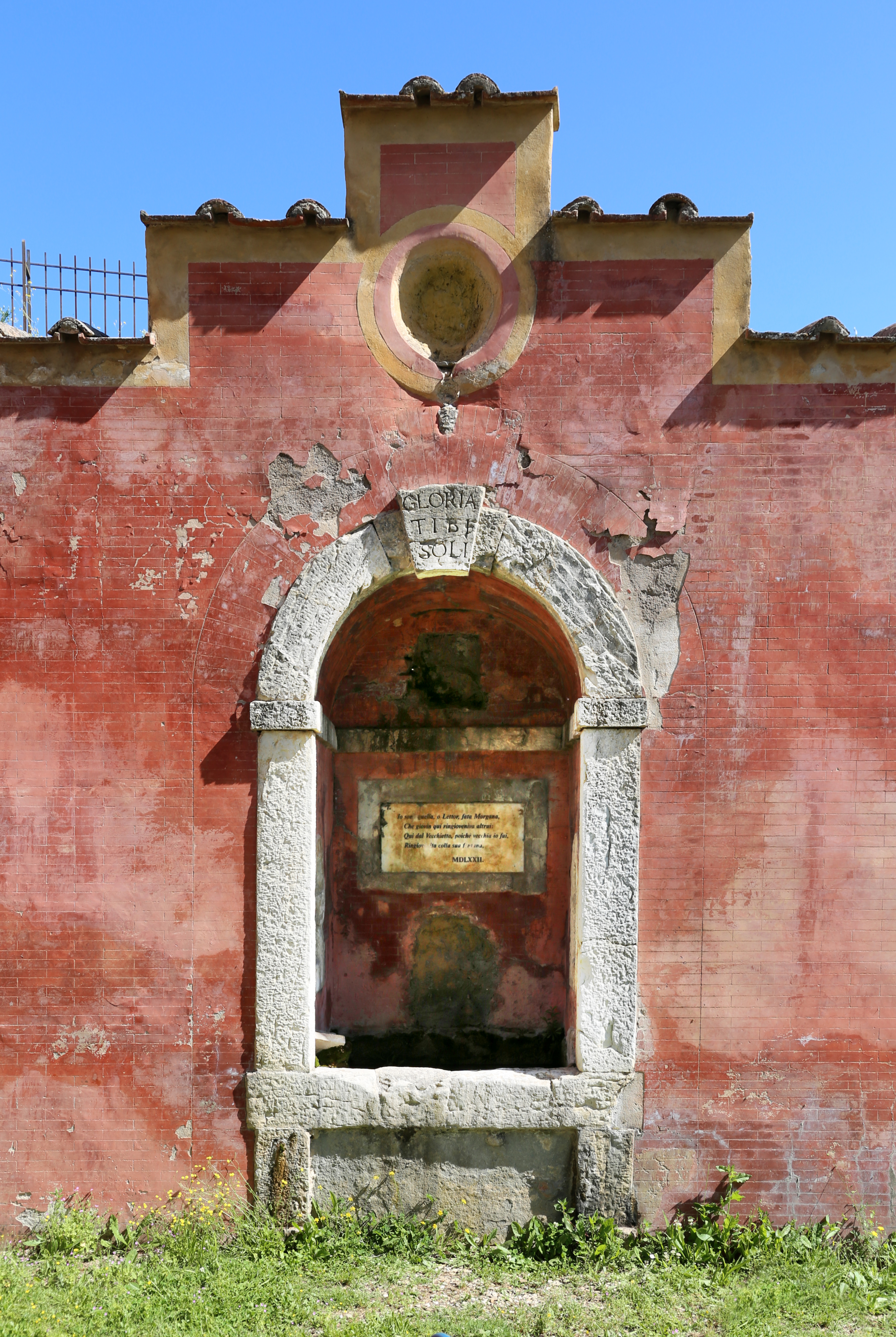 Fonte della Fata Morgana This is a photo of a monument which is part of cultural heritage of Italy.